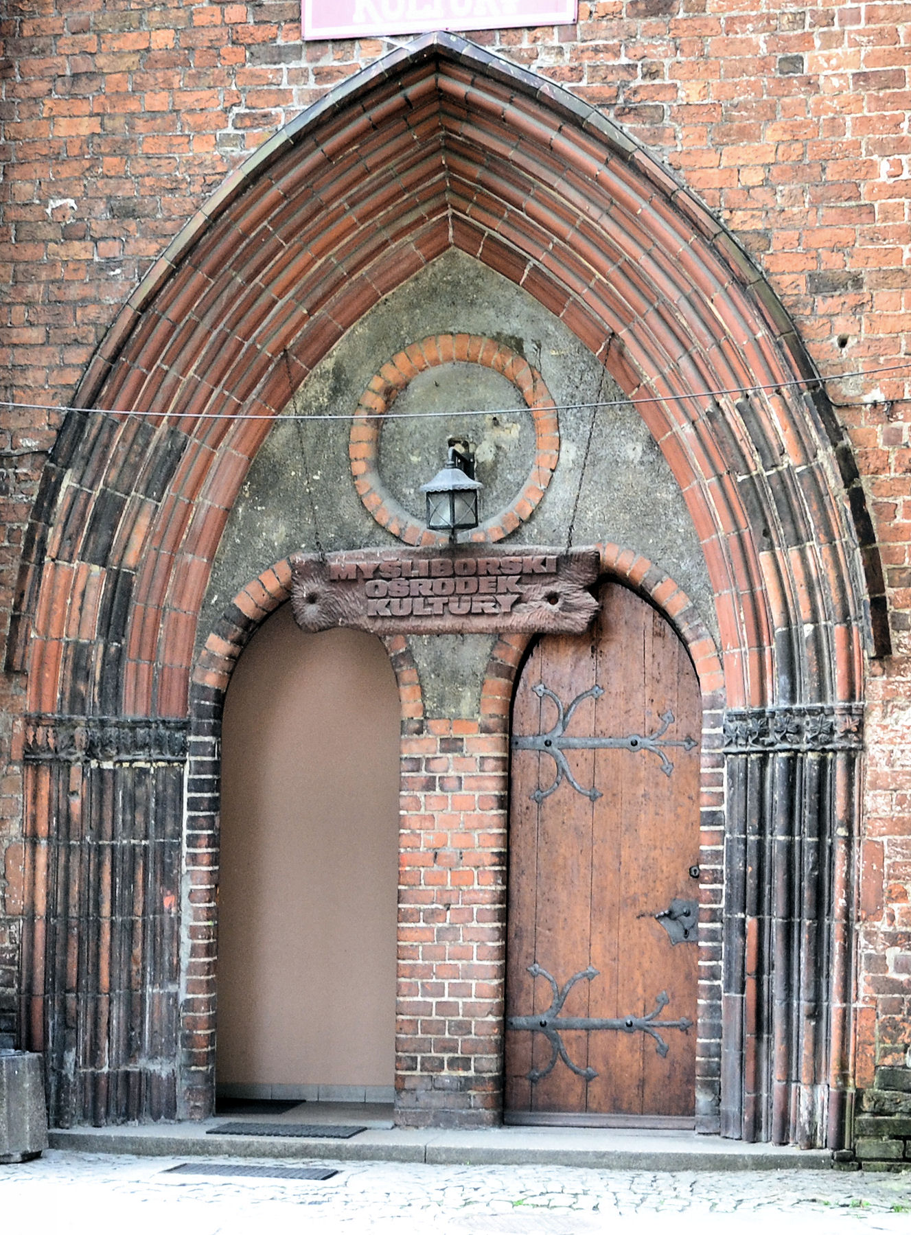 dawny klasztor dominikanów w Myśliborzu